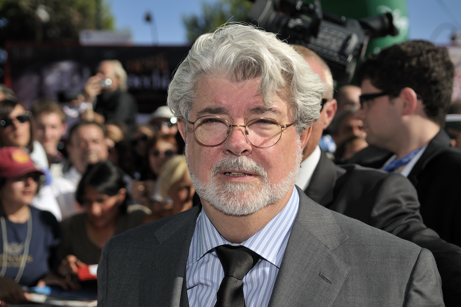 66ème Festival du Cinéma de Venise (Mostra), 5ème jour (06/09/2009) Geaorges Lucas et les réalisateurs de Pixar receoivent un Lion d'Or pour l'ensemble de leur carrière : John Lasseter (Toy Story, 1001 Pattes, Cars...), Brad Bird (Les Indestructibles, Ratatouille), Pete Docter (Monstres et Cie, Là-haut), Andrew Stanton (Le Monde de Nemo, WALL•E) et Lee Unkrich (Toy Story 2, Monstres et Cie, Le Monde de Nemo)